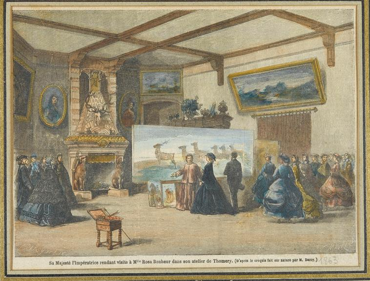 Eugénie de Montijo visite à l'atelier de Rosa Bonheur à Thomery.